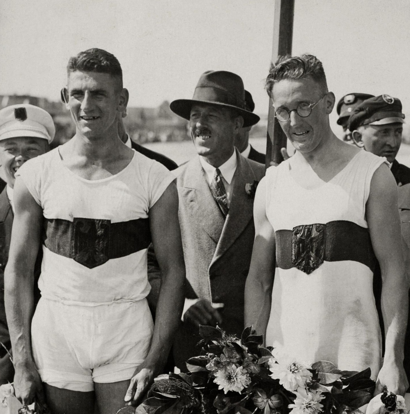 Olympische Spelen Amsterdam, Nederland, 1928: Roeien. In de categorie twee zonder stuurman werden de Duitsers K. Moeschter en B. Müller olympisch kampioen.